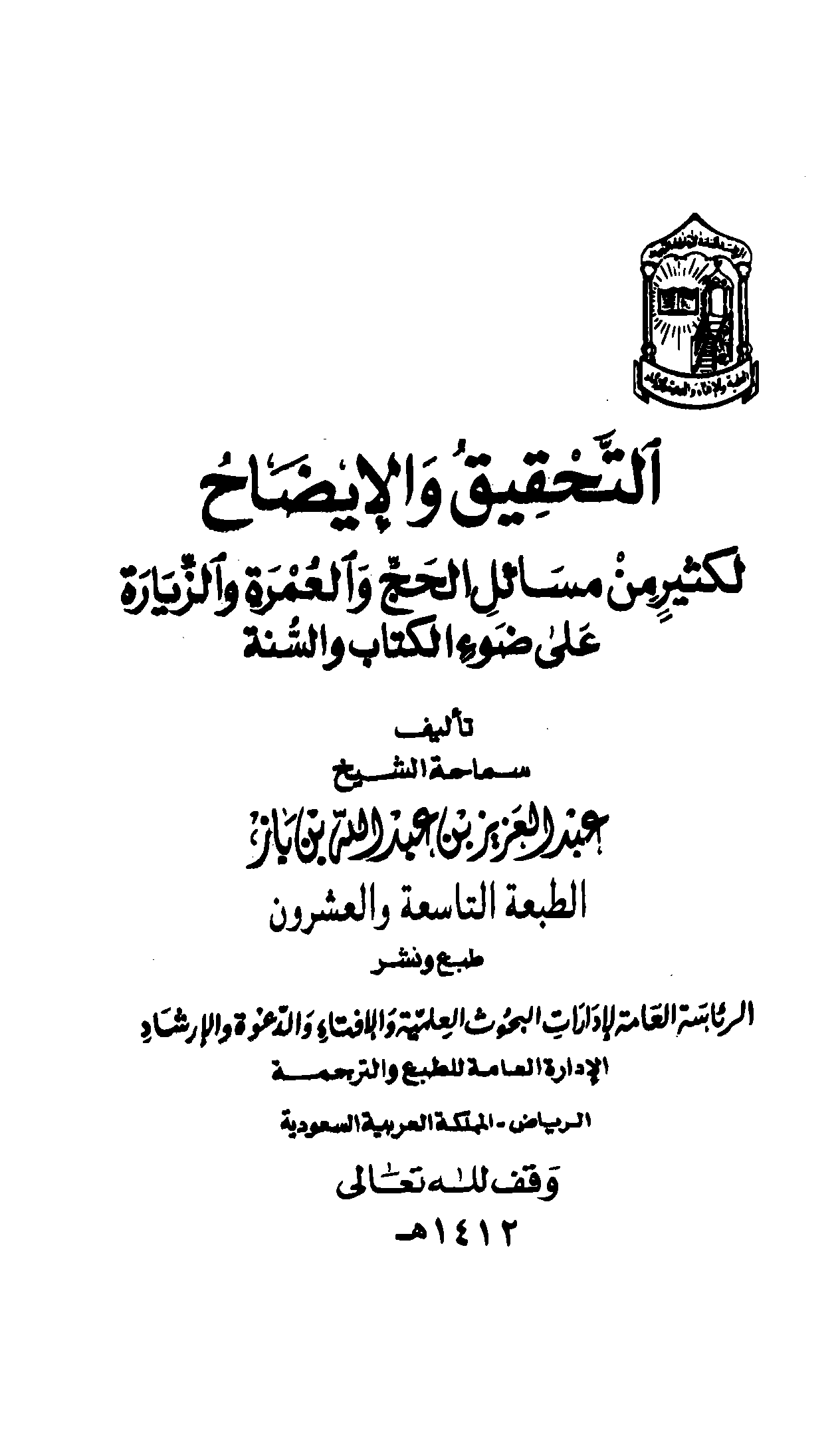 كتاب لشرح مسائل الحج والعمرة لعبد العزيز بن باز